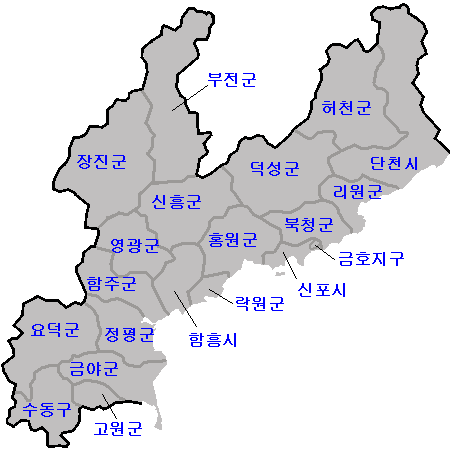 함경남도 행정구역 지도